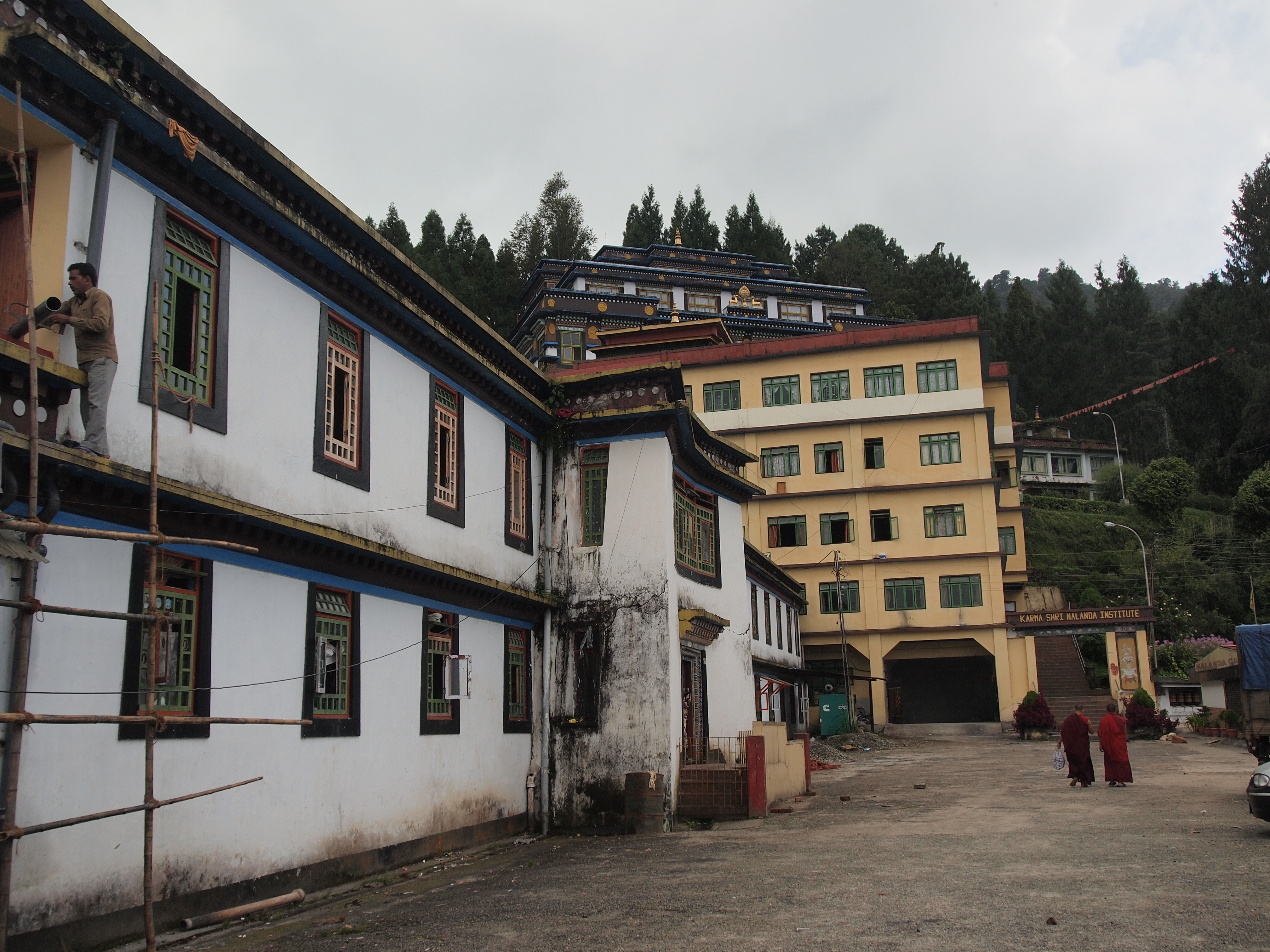 大寶法王(噶瑪巴)的廟，有他的寶座，但因為兩個噶瑪巴，所以印度不准他回來坐床，喇嘛有噶瑪巴回歸行動，廟有士兵把守